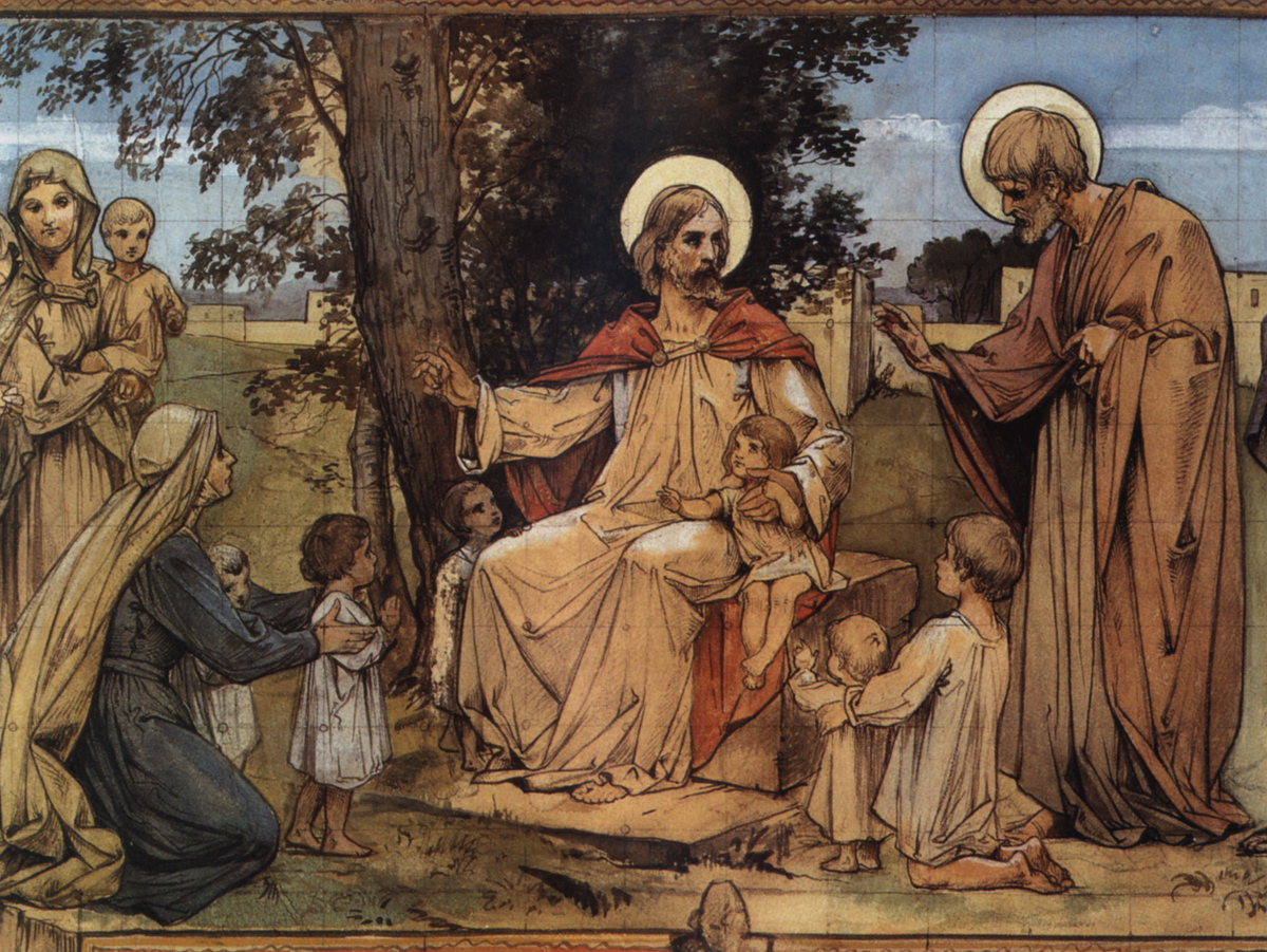 Segnender Christus, Entwurf zum Wandbild in der Stuttgarter Stiftskirche, 1894, von Rudolf Yelin d.Ä. (1864-1940)